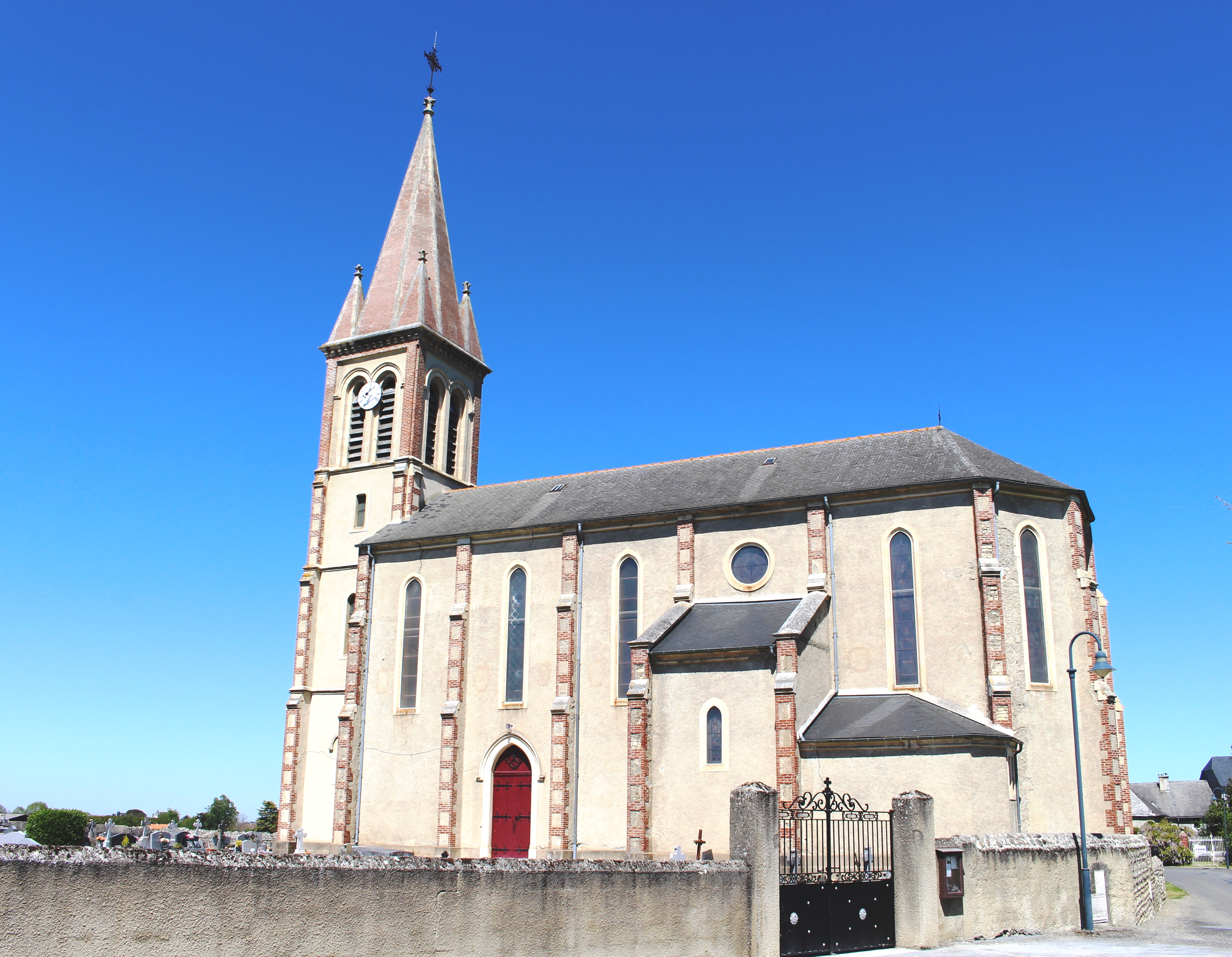 Église Saint-Étienne de Bernac-Dessus (Hautes-Pyrénées)